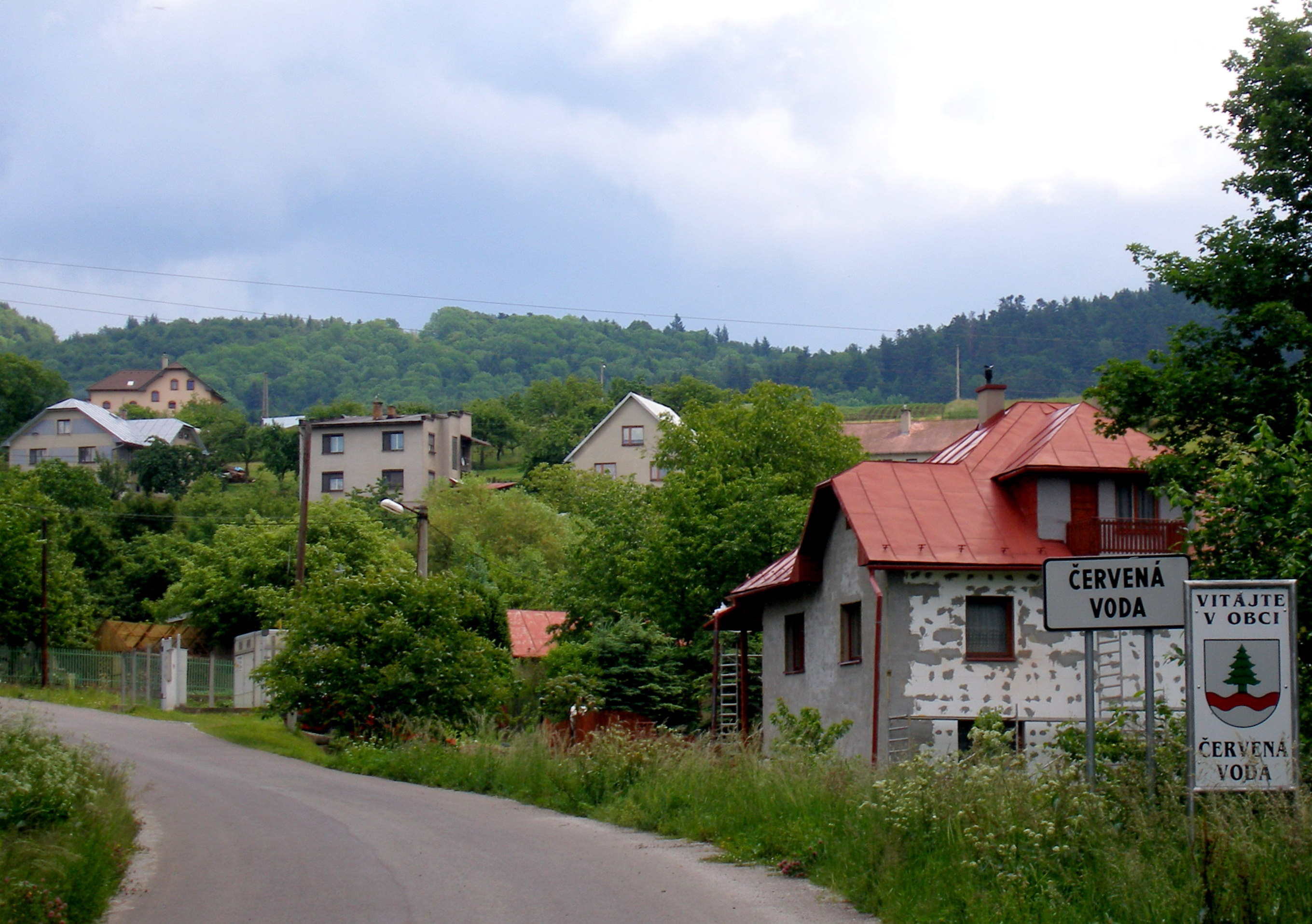 Obec Červená Voda okres Sabinov